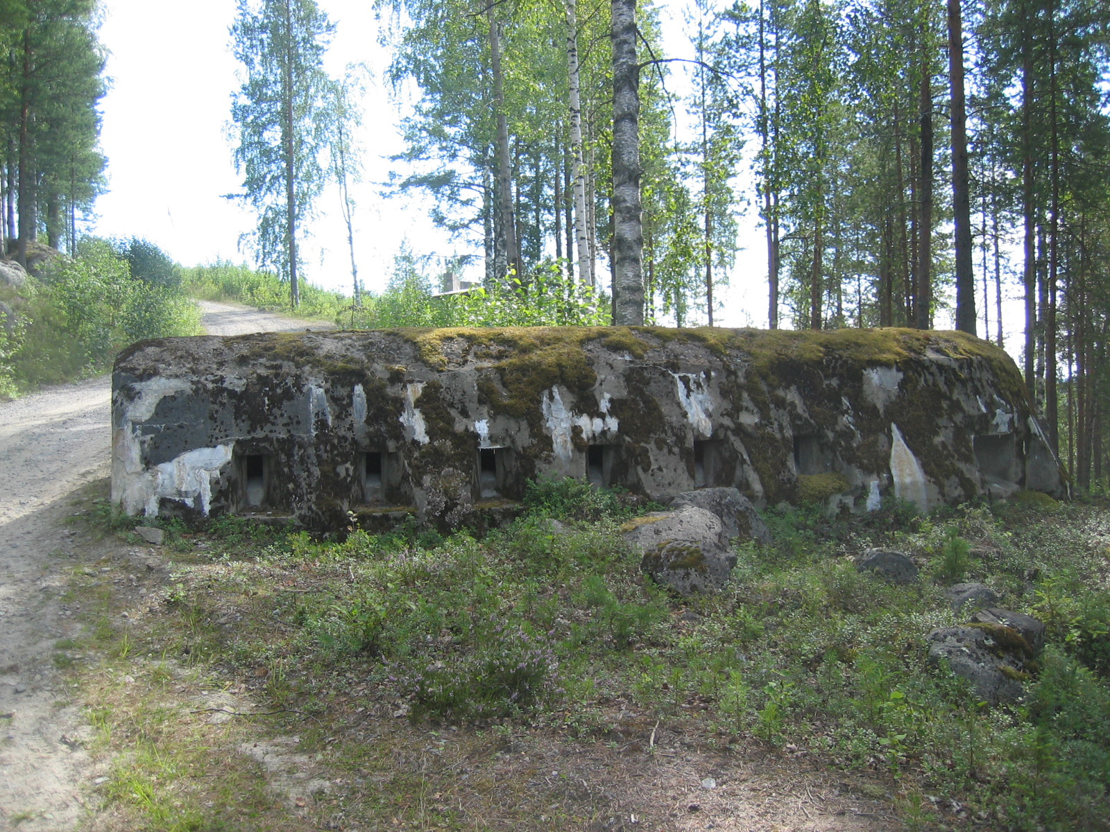 A bunker at Rödberget fort, part of Boden Fortress.